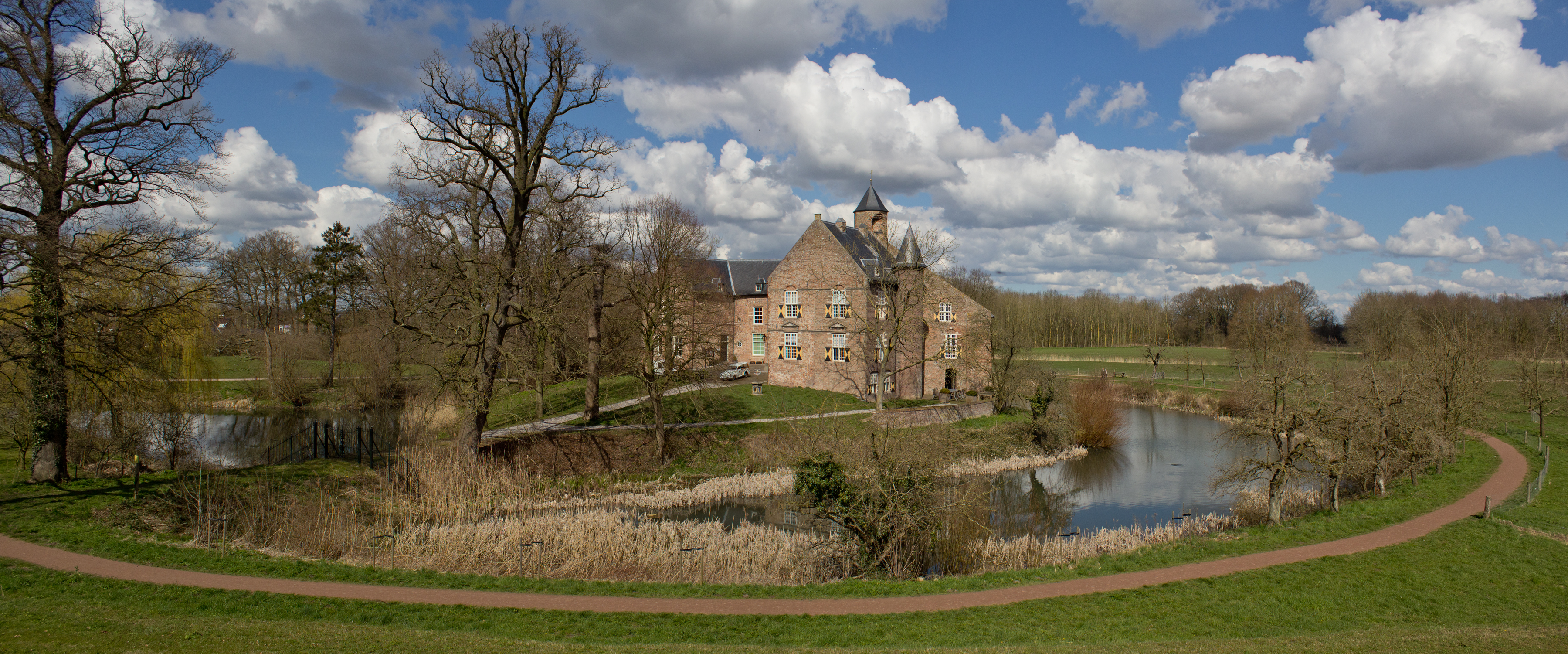 Waardenburg: historische tuin- en parkaanleg